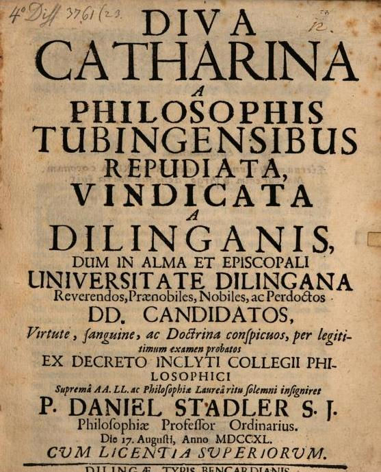 Buchtitelblatt Daniel Stadler, Jesuit (1705-1764) Beichtvater und Berater des Bayerischen Kurfürsten Max III. Joseph